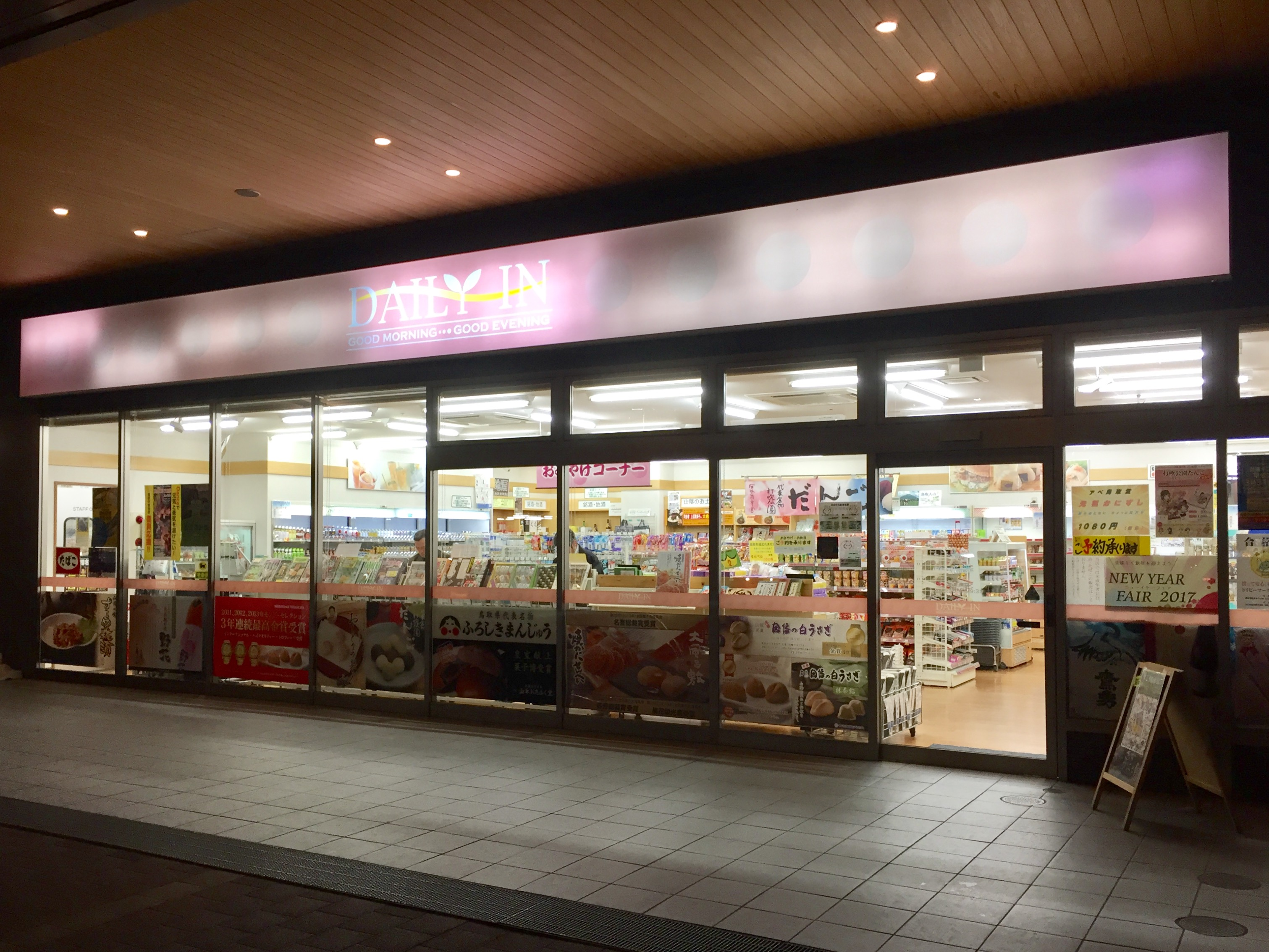 倉吉駅構内（南口）にあったデイリーイン最後の店舗。同店も2018年10月31日に一時閉店し、「セブン-イレブン ハートインJR倉吉駅店」（倉吉市内初のセブン-イレブン）として同年12月21日にリニューアルオープンしている。